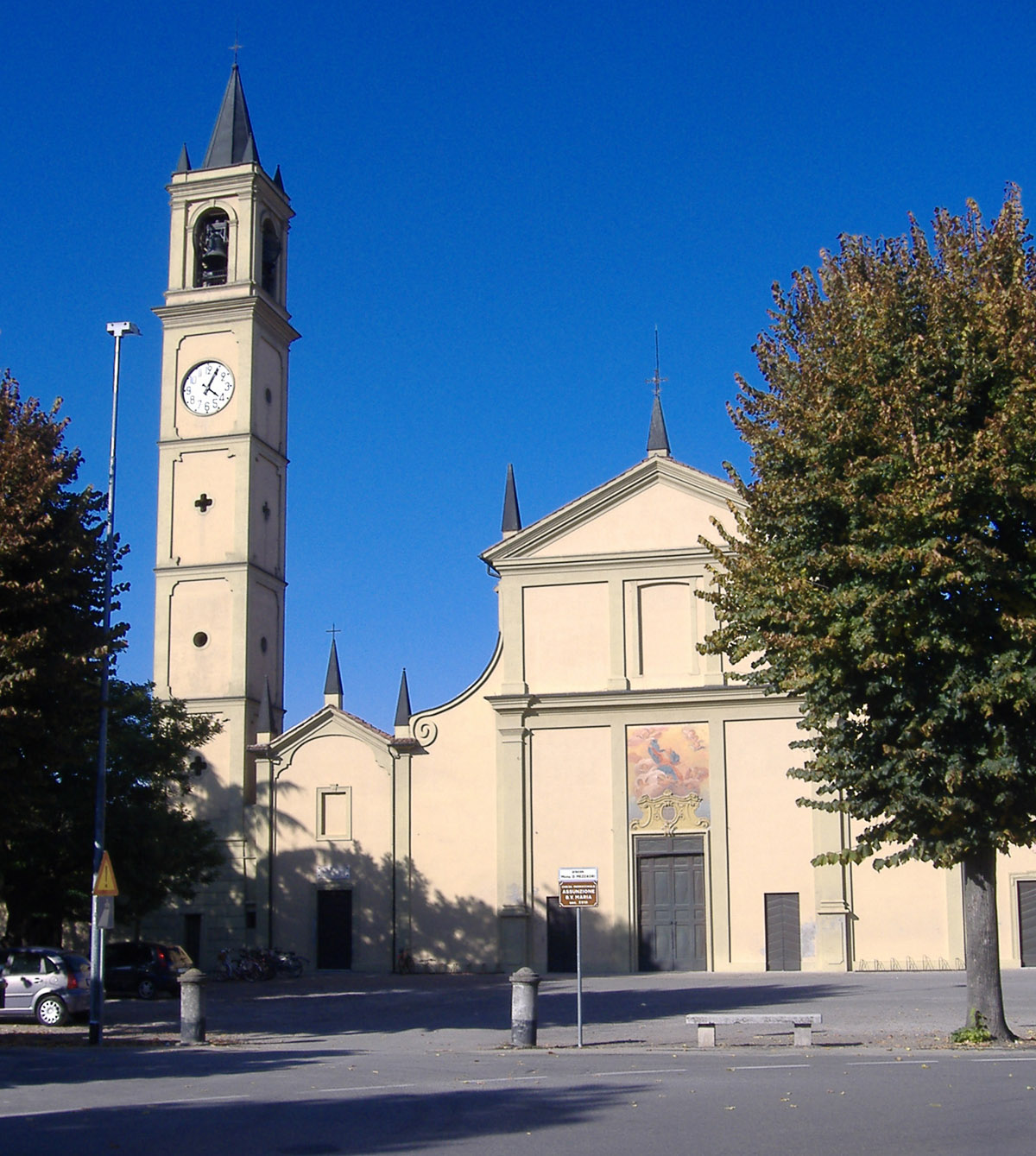 La Chiesa parrocchiale di Caselle Landi - Italia